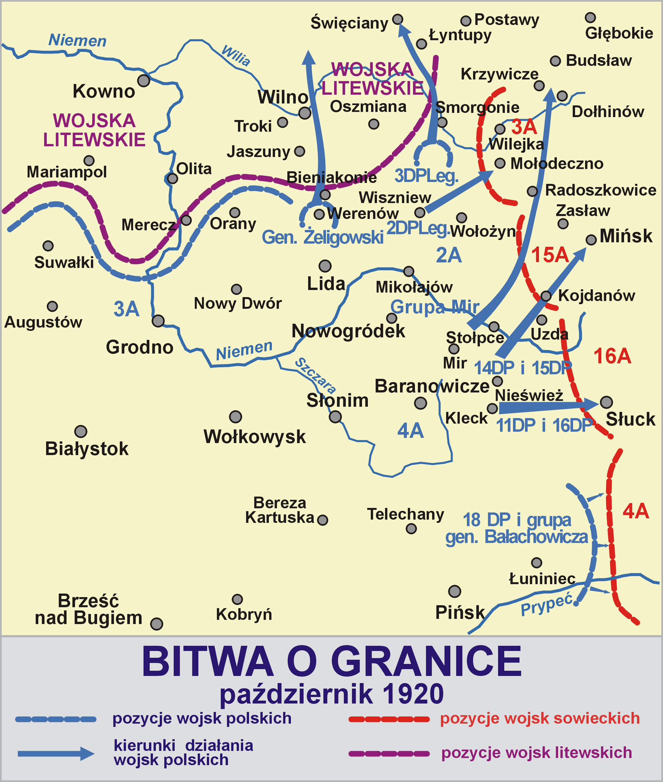 Bitwa o granice Polski - październik 1920